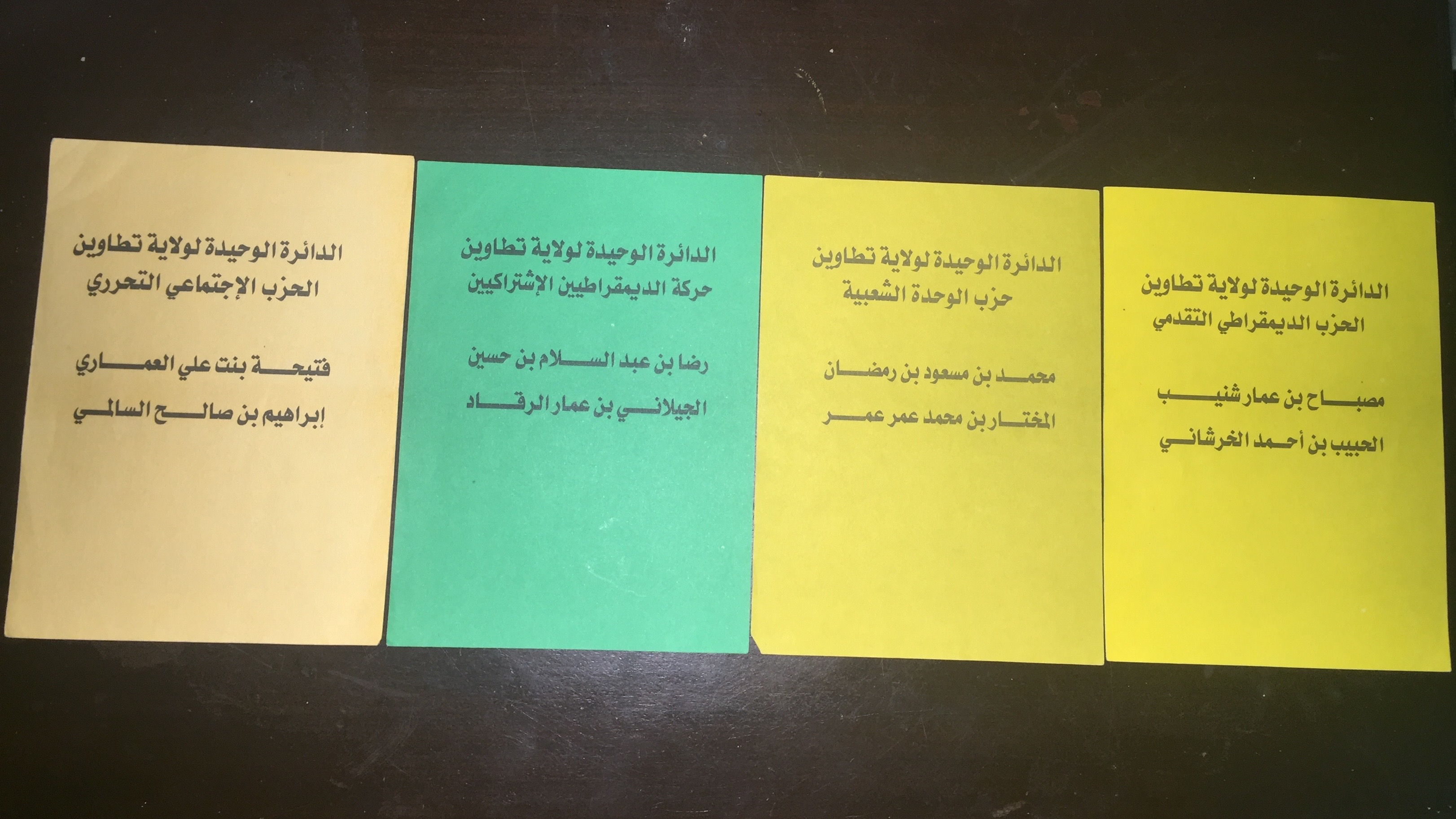 Bulletins des candidats aux législatives Tunisie 2009 hormis RCD - circonscription de Tataouine.